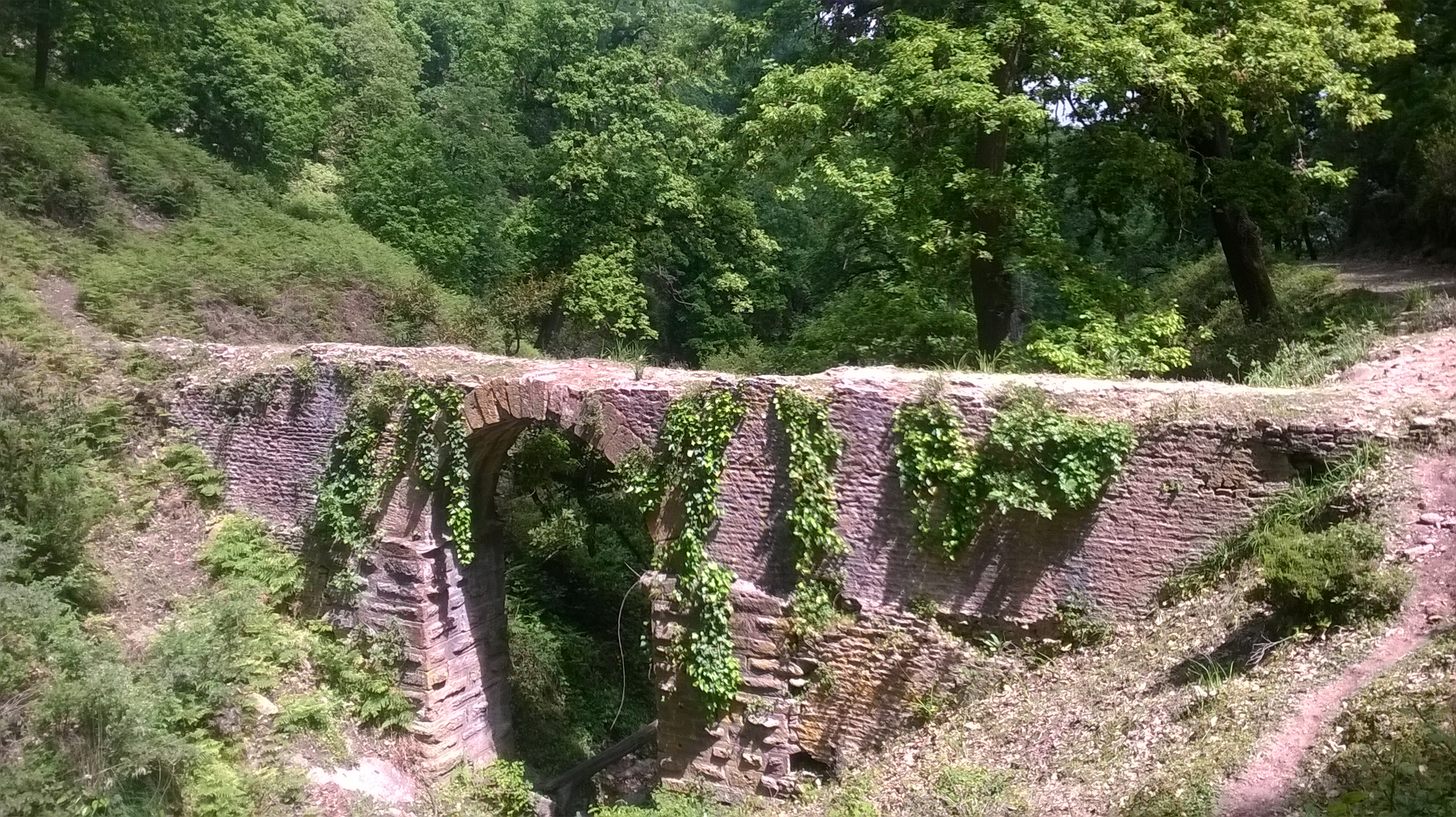 Point de Départ de l'aqueduc romain dans la forêt de Séraïdi à Annaba (près de Sainte - Croix), les restes de cet ouvrage subsistent encore dans les hauteurs de l'Edough.